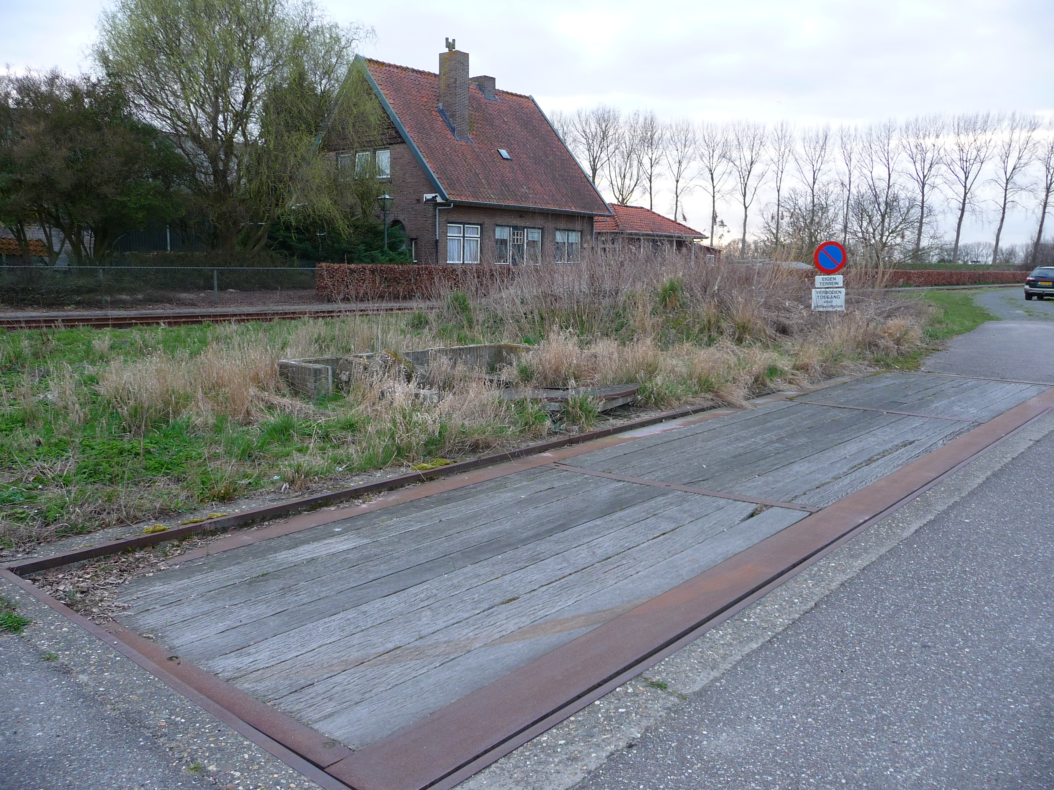 Weegbrug en weeghuisje bij station Kwadendamme. Het huisje in inmiddels met de grond gelijk gemaakt. Bouwjaar 1927.